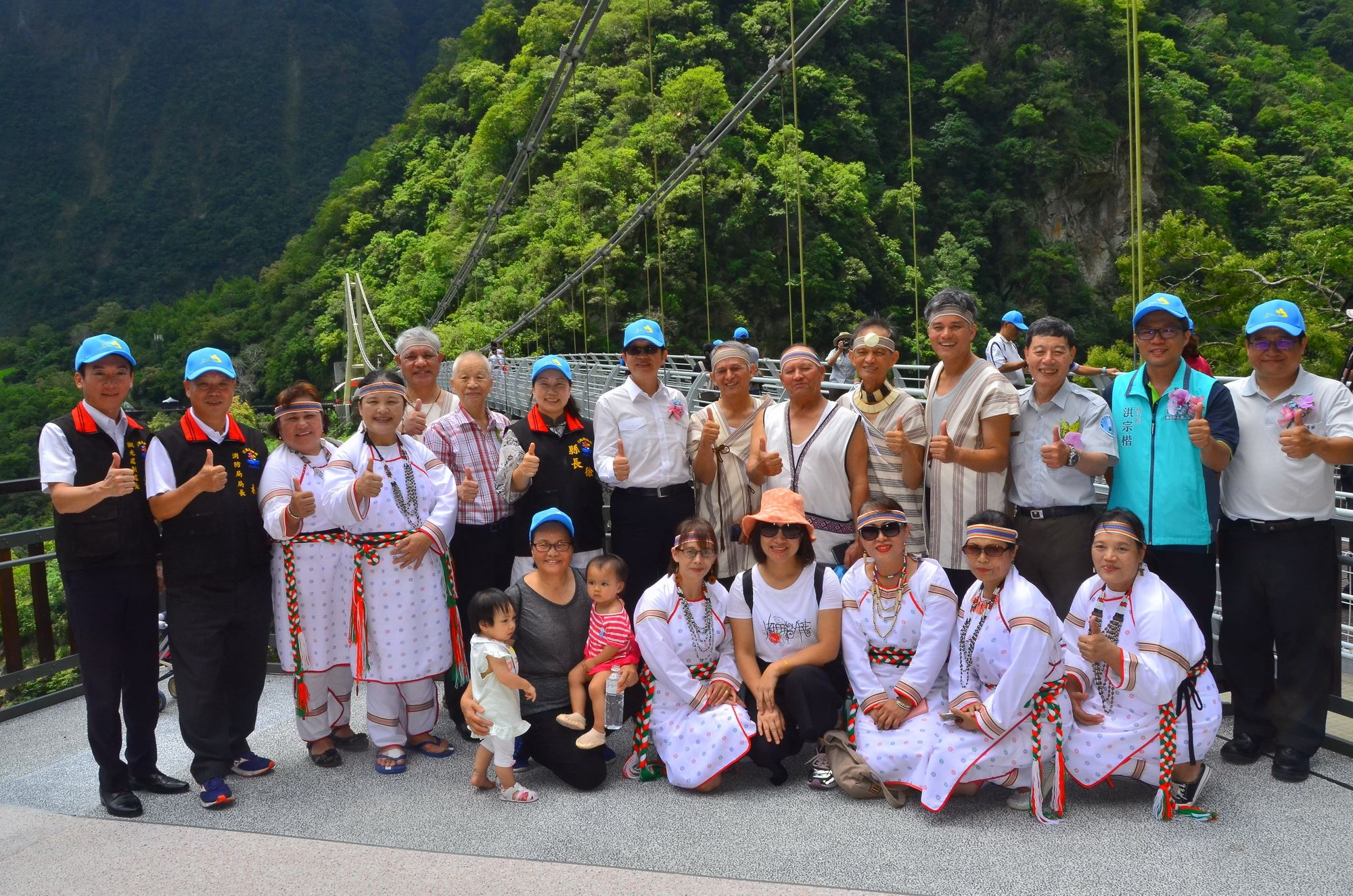 中文（台灣）: 絕美! 太魯閣「山月吊橋」啟用 內政部：歡迎預約走訪